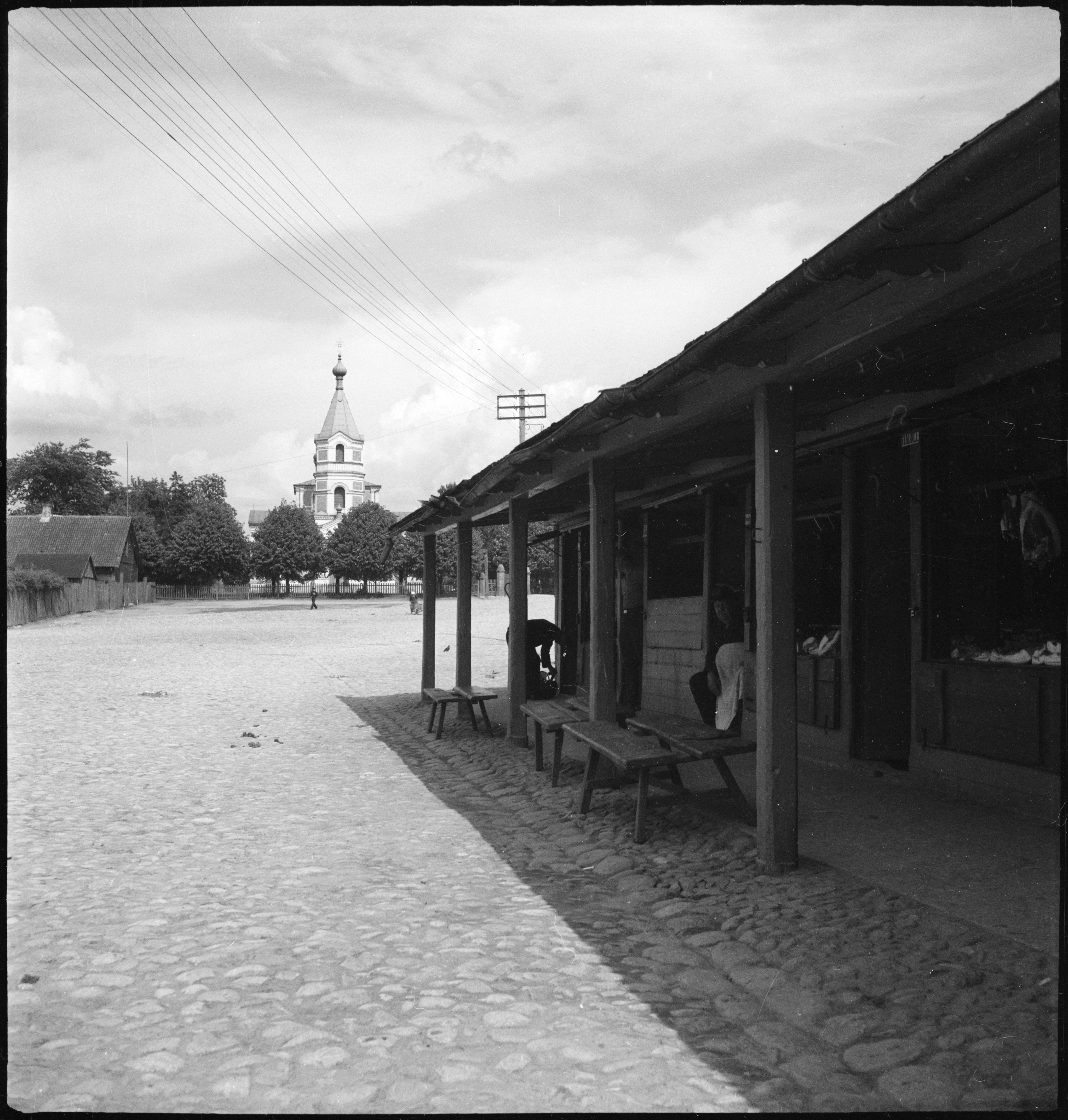 Estland, Valk/Walk (Valga): Stadtansicht; Orthodoxe Kirche in Valk